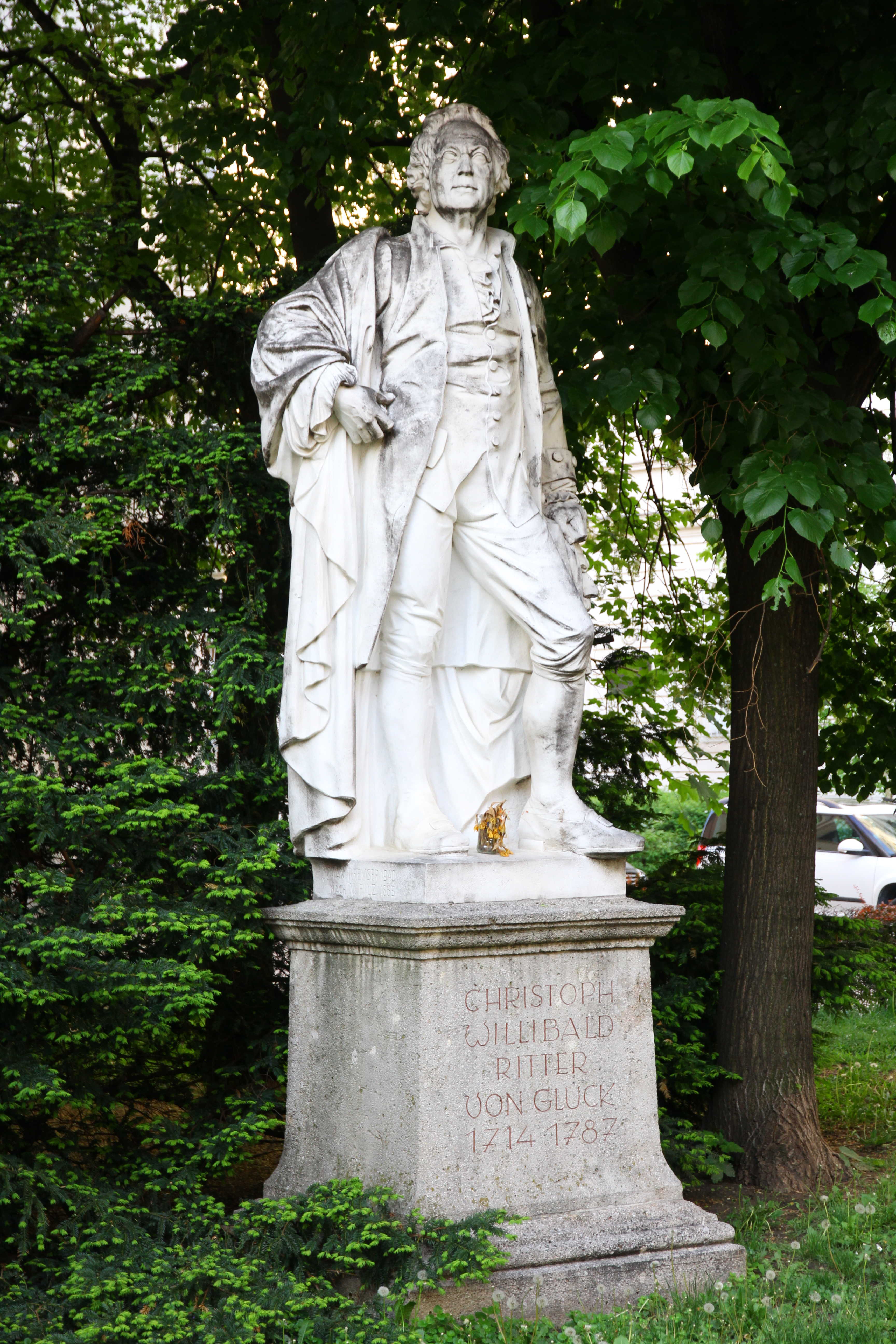 Christoph Willibald Ritter von Gluck